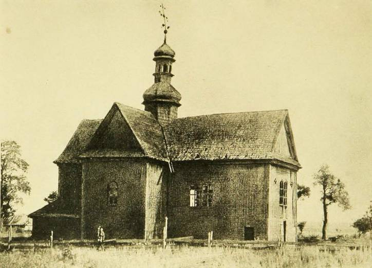 Беларуская (тарашкевіца): Лыскаў (Łyskaŭ). Царква пры манастыры базылянаў